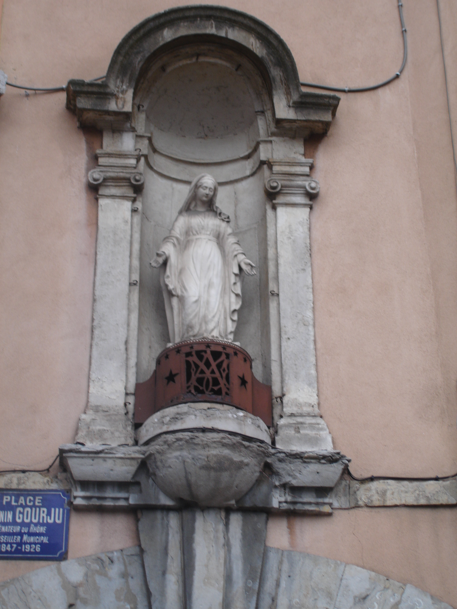 Lyon : la vierge de la place Gourjus (près des quais de Saône et du pont Bonaparte